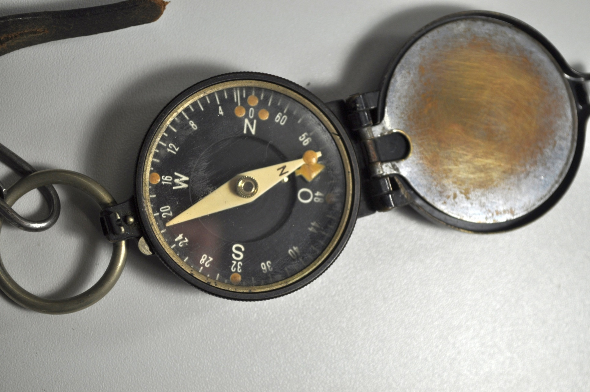 Uniformjacke des 11. Bayerischen Infanterieregiments "von der Tann" (Regensburg) von Xaver Späth von Pfatter, dazu der Kompass, der an der Uniformjacke befestigt war, und ein Grabendolch mit Scheide, der am Koppel, aber auch oft im Stiefel getragen und beim Nahkampf verwendet wurde. Xaver Späth von Pfatter war von Beruf Landwirt. Die Stücke hat der Teilnehmer von der Urenkelin erhalten.